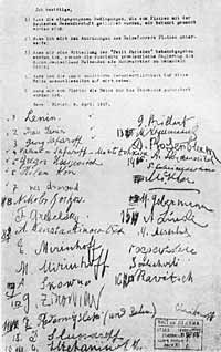 Подписи Ленина и других эмигрантов под условиями проезда через Германию